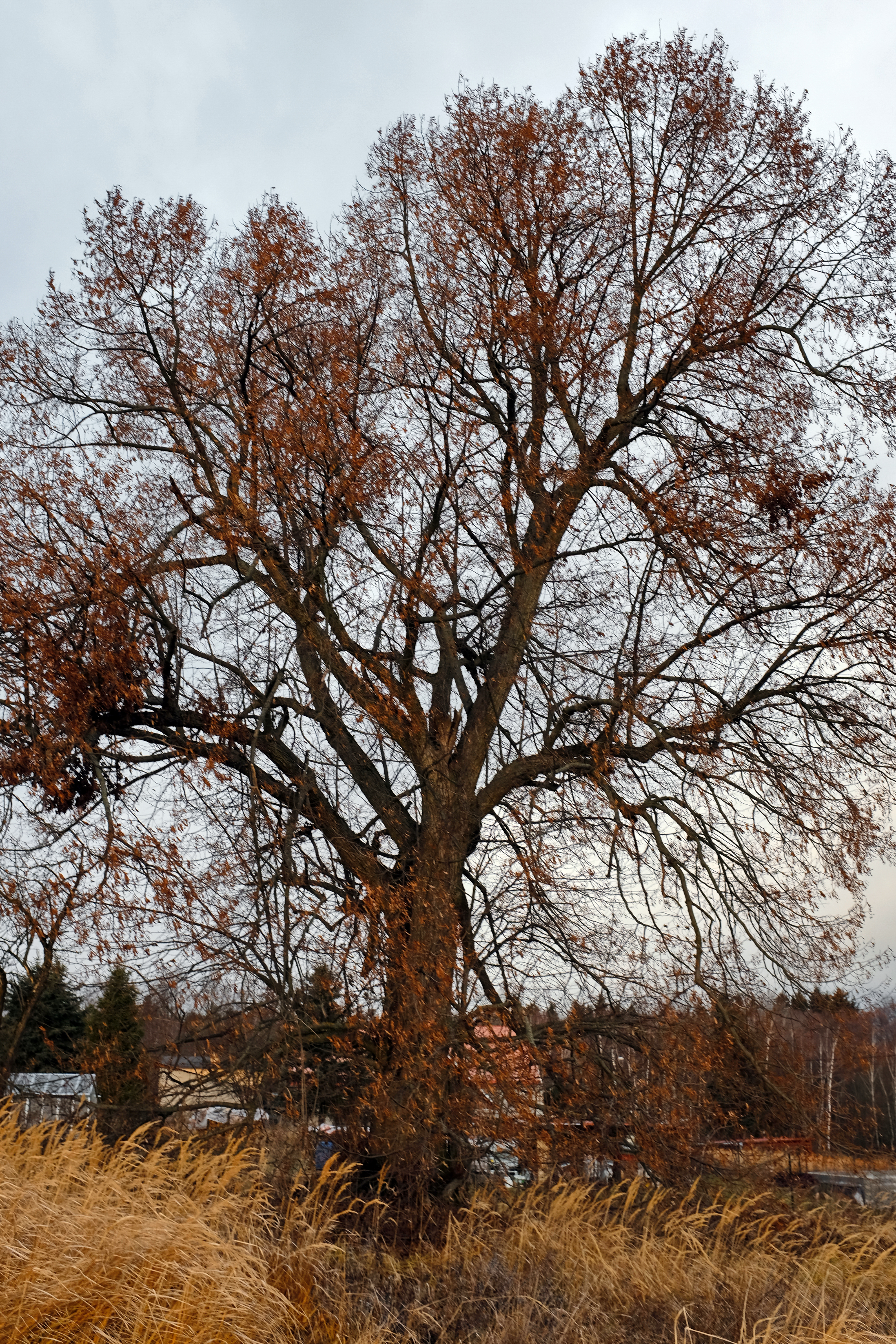 Památný strom - Radvanovská lípa, Radvanov, okres Sokolov